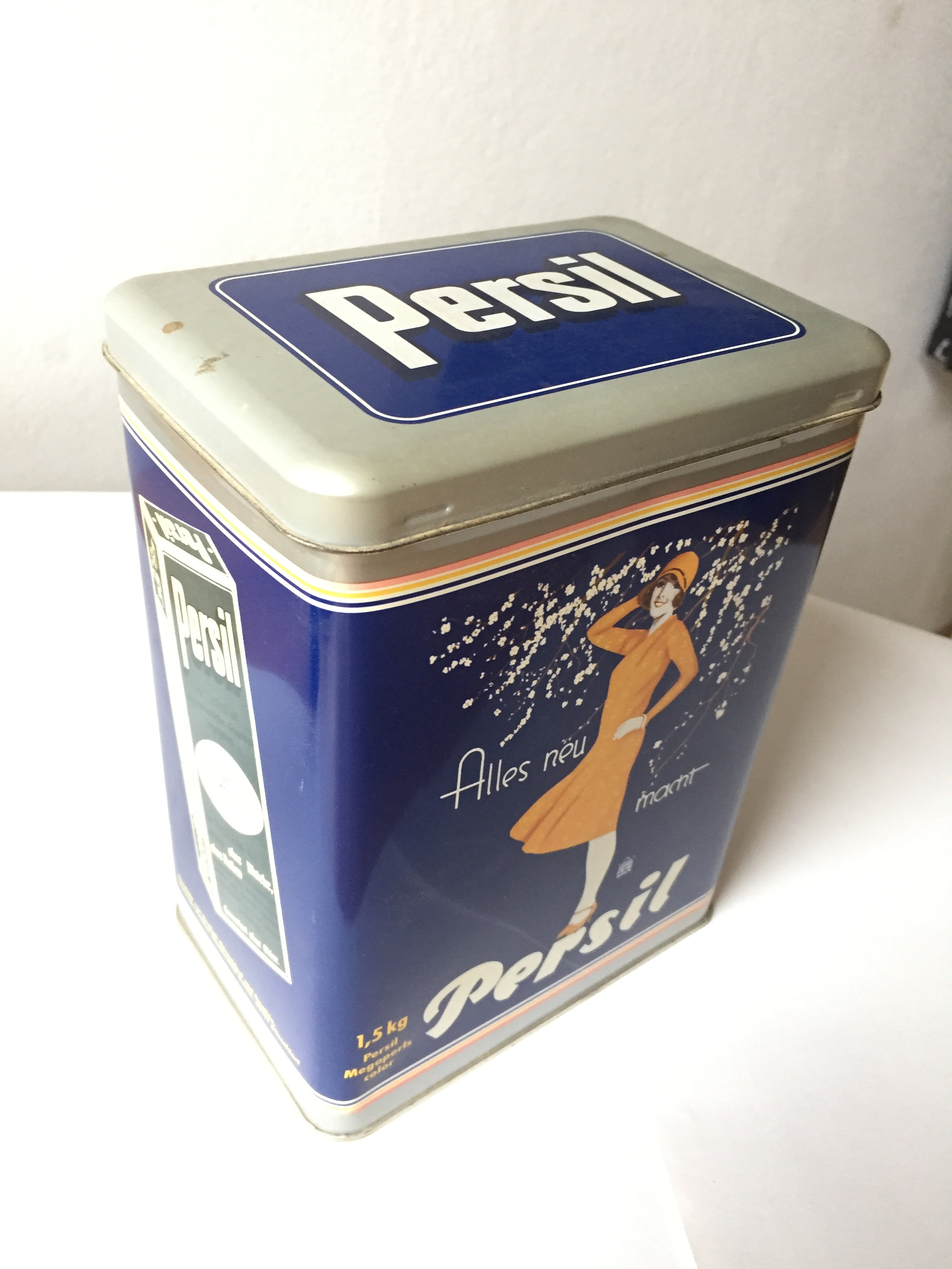 Persil - nostalgische Dose